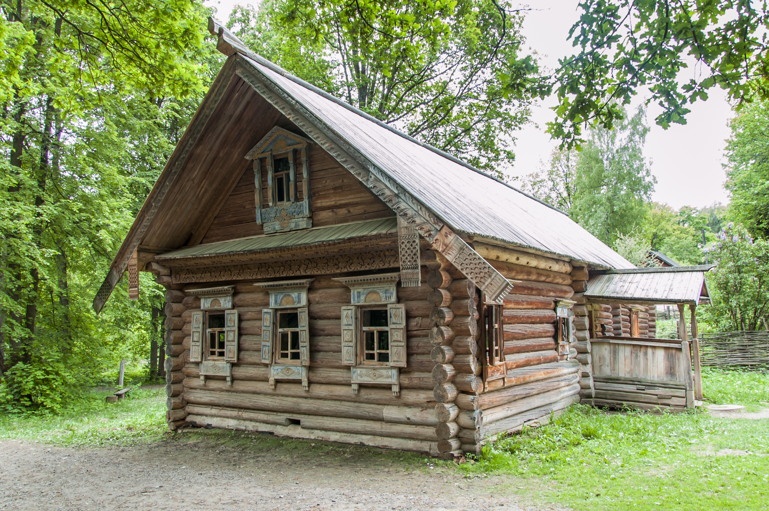 Изба Обуховой (деревянная): улица Горбатовская, 41, Нижний Новгород, Нижегородская область